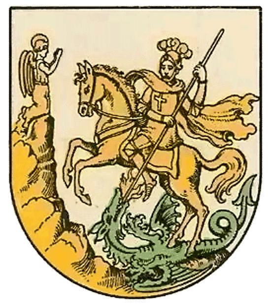 Wappen von Kagran (bis 1904 eine eigenständige Gemeinde und ist heute ein Stadtteil Wiens im 22. Wiener Gemeindebezirk Donaustadt): Sankt Georg mit goldener Rüstung und silbernem Pferd und geschlagenem Drachen auf dem Rücken liegend tötet den Drachen. Links betet ein Engel auf einem Berg.